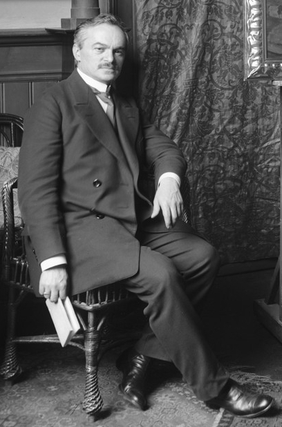 Porträt Simon Glücklich (detail)